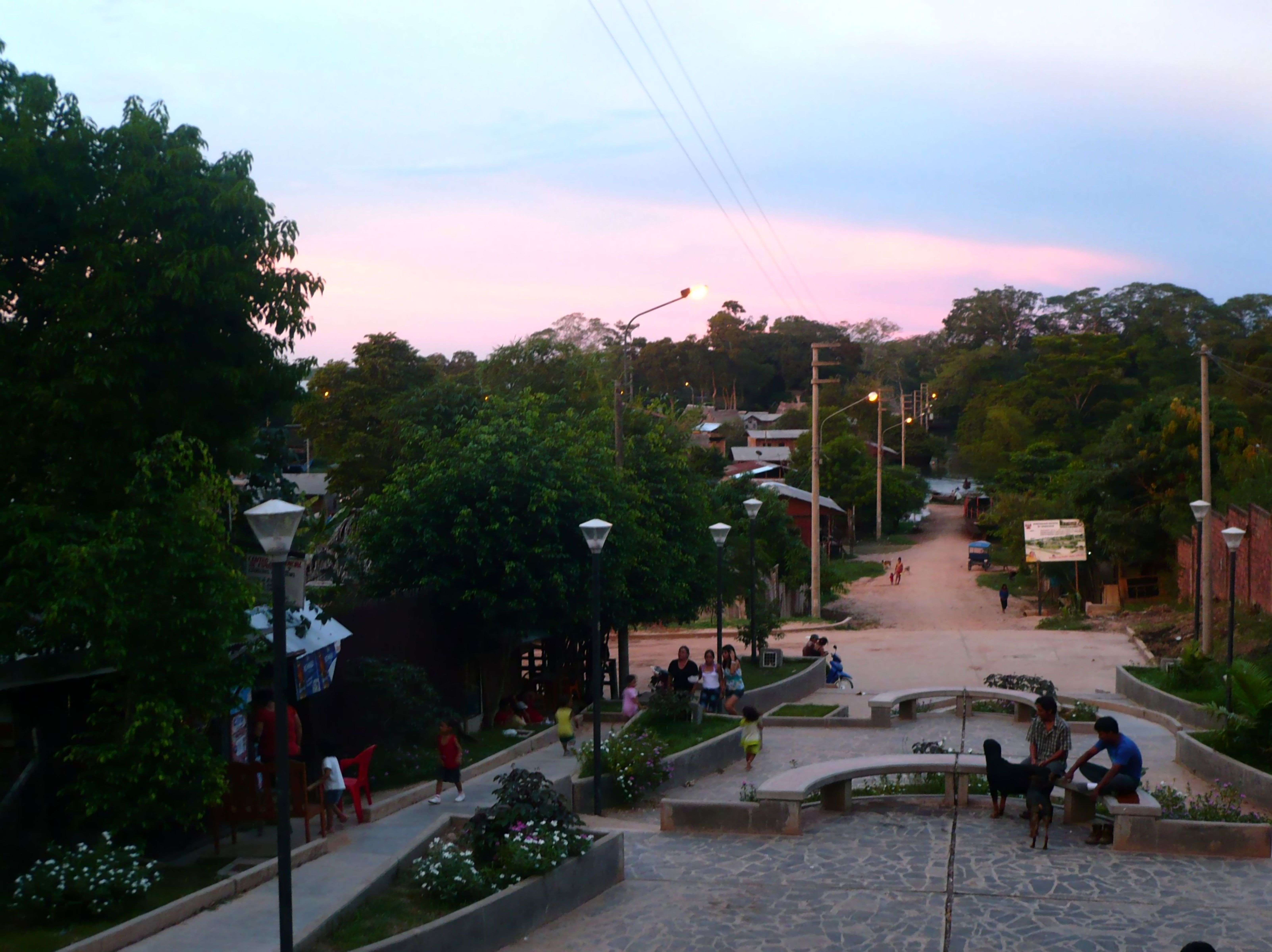 Vista de una de las calles de la ciudad de Puerto Callao, ubicado en la urbe de Pucallpa. En la cual es el bulevar de la laguna de Yarinacocha.